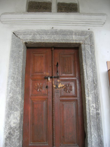 Sultan Alaeddin Cami, Ankara , Türkiye